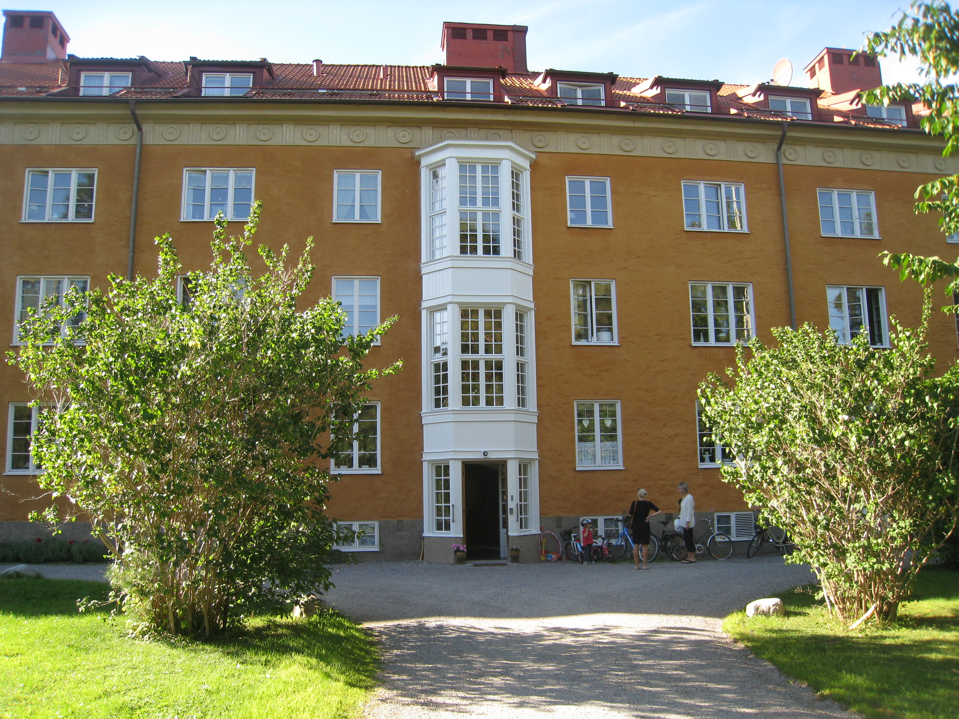 Lärarinnehemmet Tennhjärtat, Smedslätten. Huset ligger i kvarteret Tennhjärtat på Herman Ygbergs väg 2-10 i Smedslätten, Bromma.